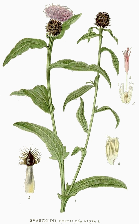 Original Description Svartklint, Centaurea nigra L.